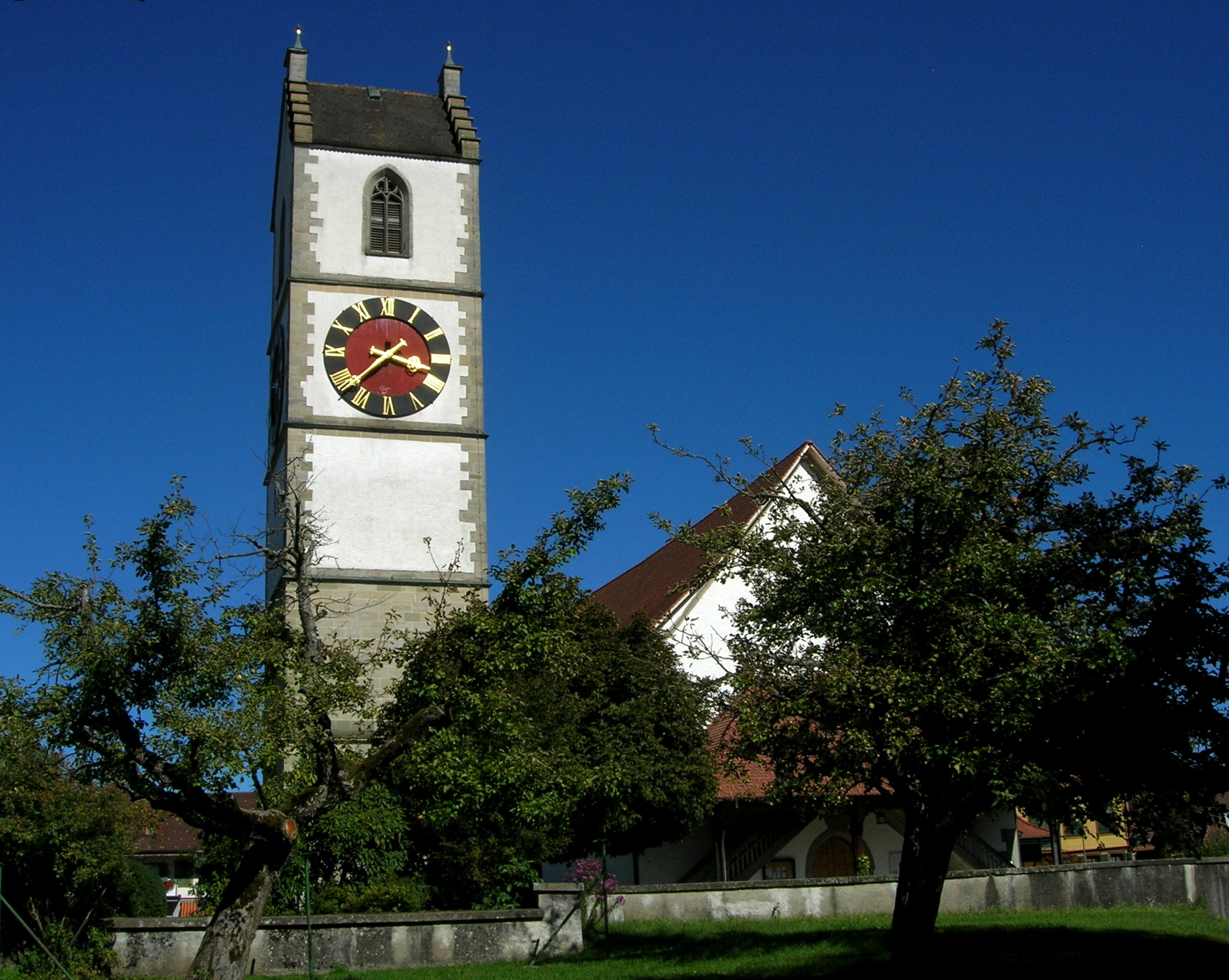 Kirche Sumiswald,Aufnahme nachmittags